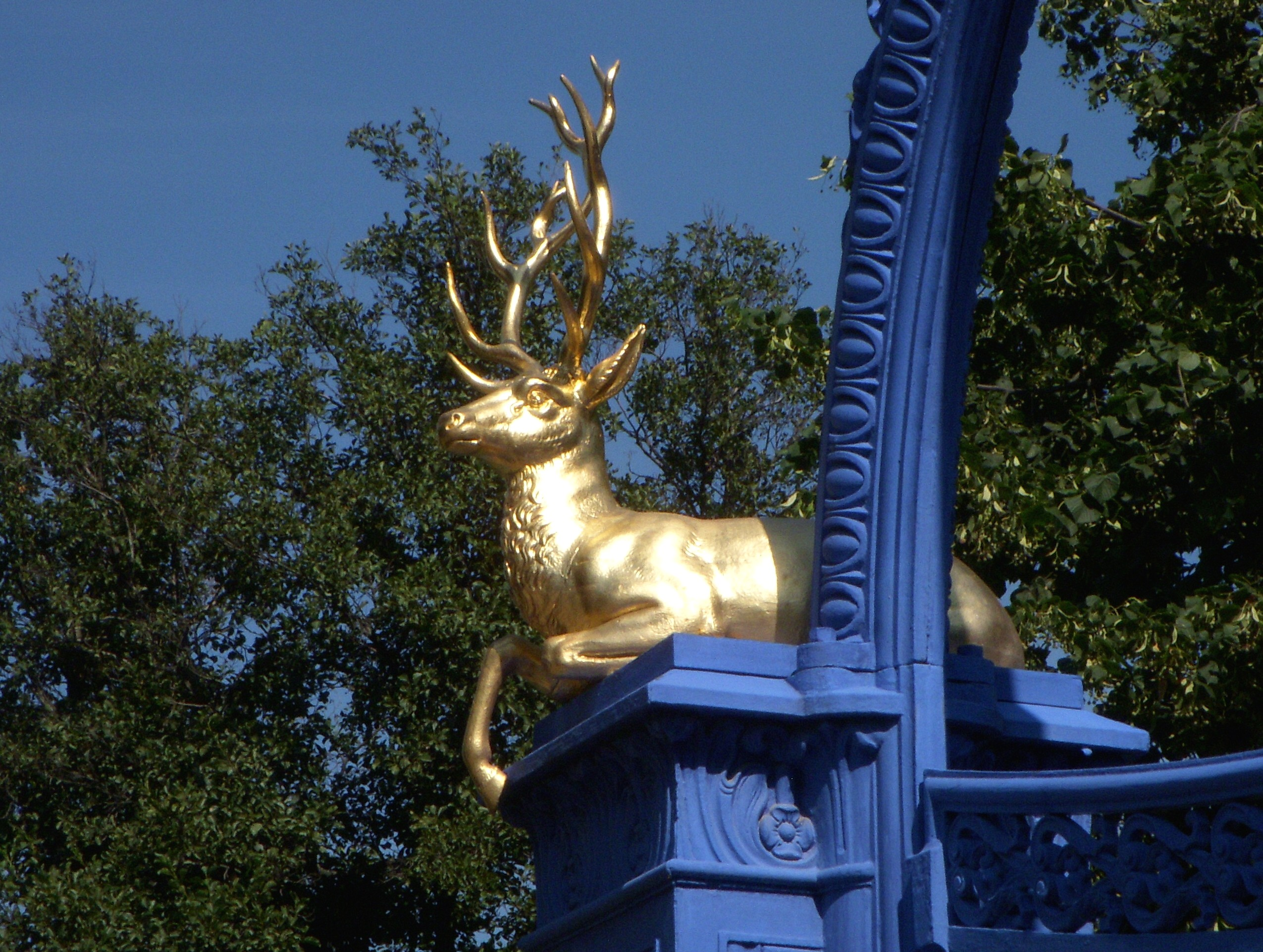 Blå porten på Djurgården, en av hjortarna